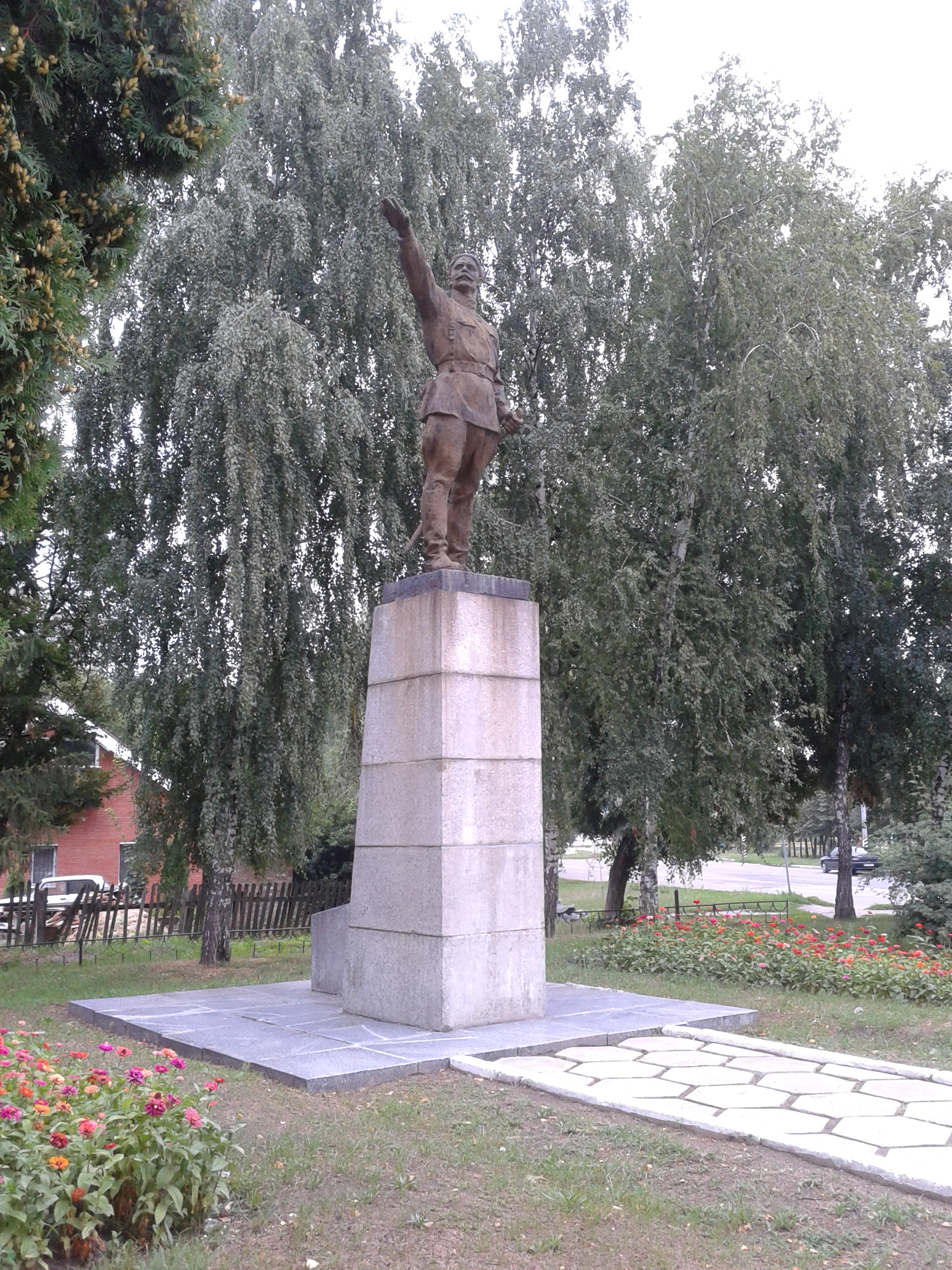 Пам’ятник В.І.Чапаєву в Лубнах